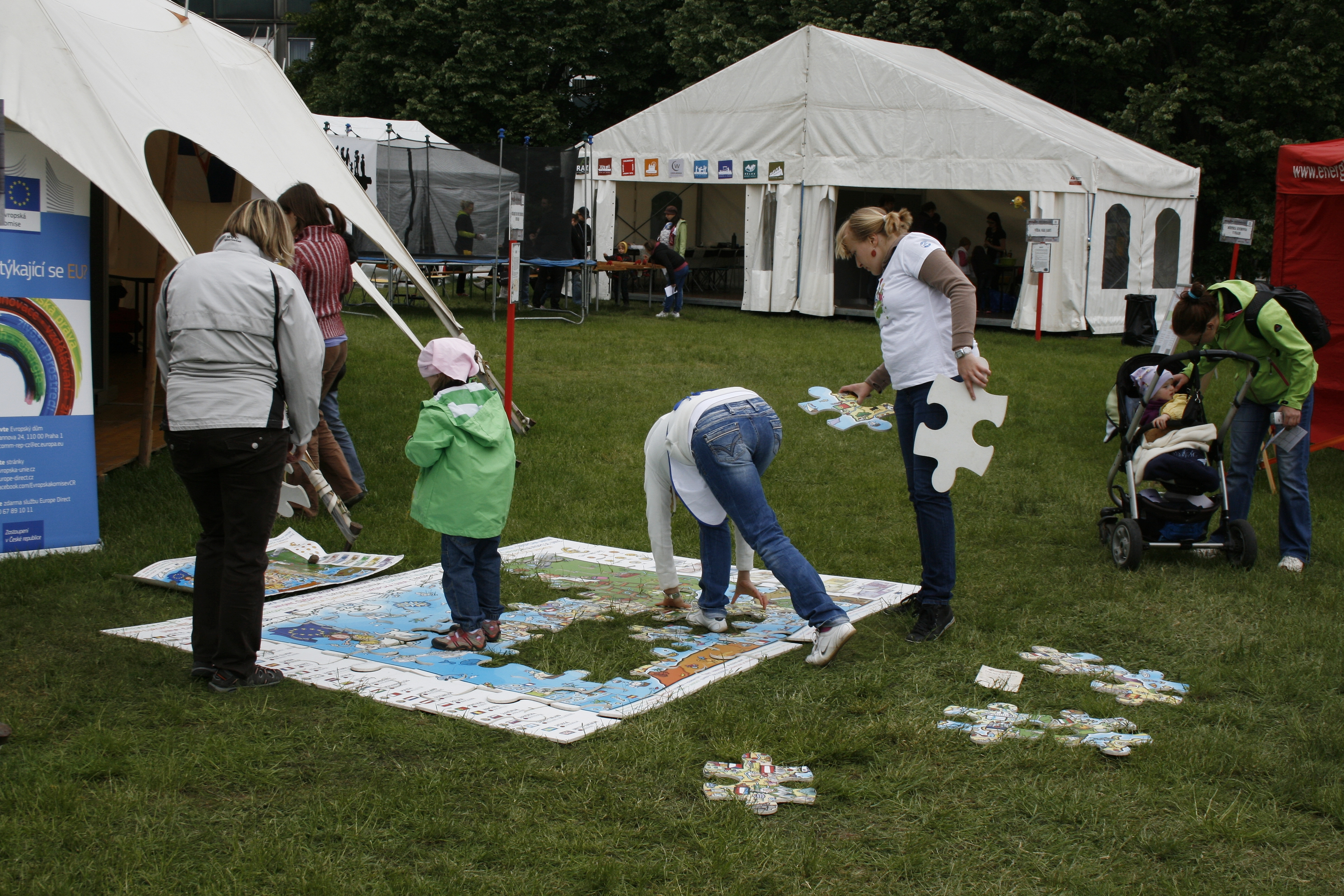 Praha, Vítězné náměstí - Bambiriáda 2013